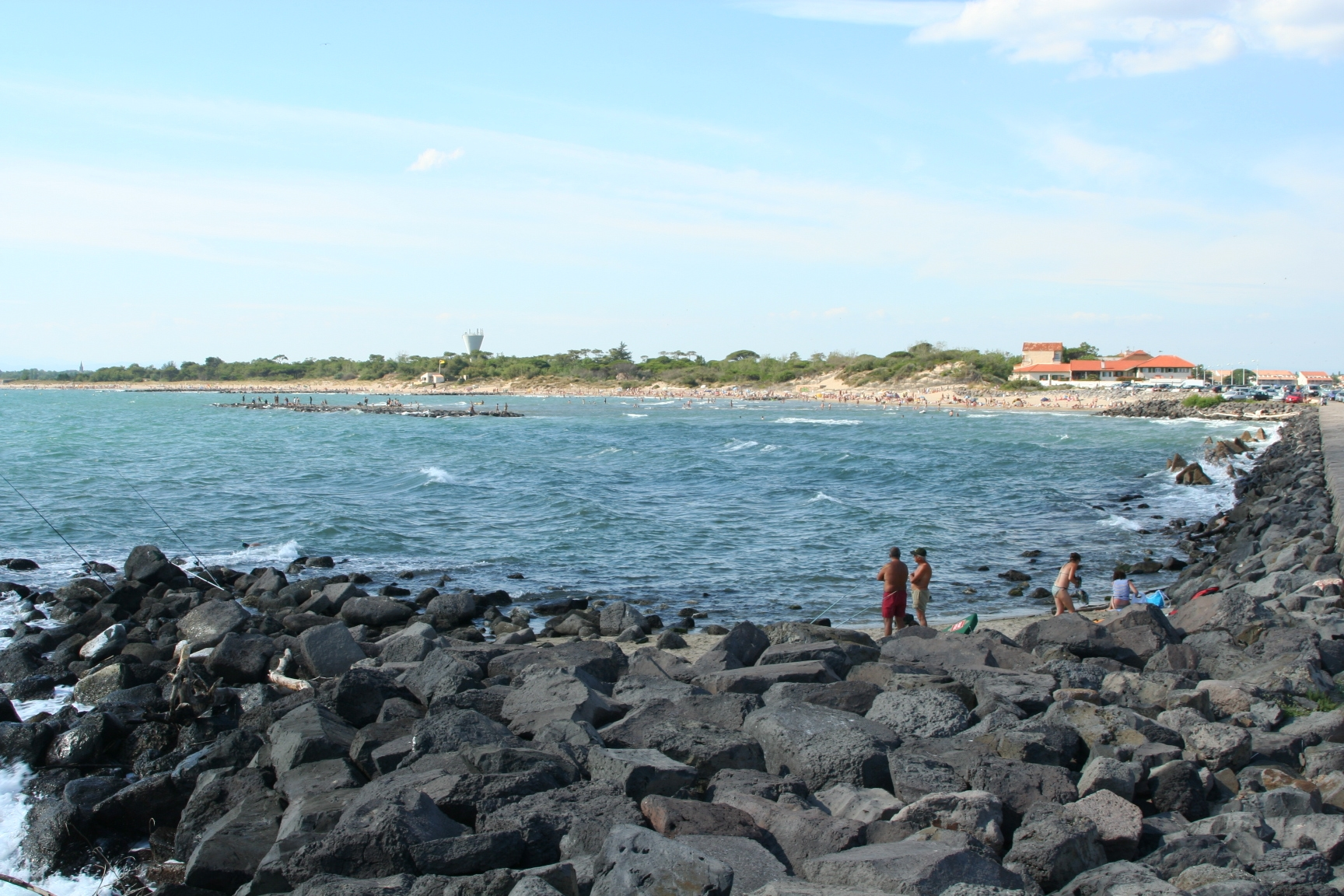 Plage de la Tamarissière à Agde (Hérault, France) vue depuis la jetée de l'Hérault.